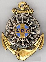 insigne régimentaire du 4e régiment d'infanterie coloniale, maintenant le 4e régiment d'infanterie de marine.